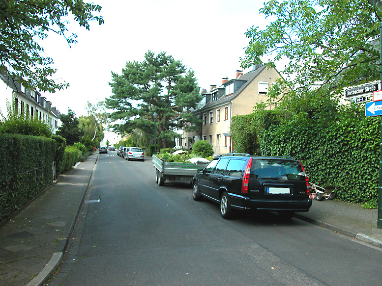 Die Straße "Ansbacher Straße" in Benrath, Düsseldorf